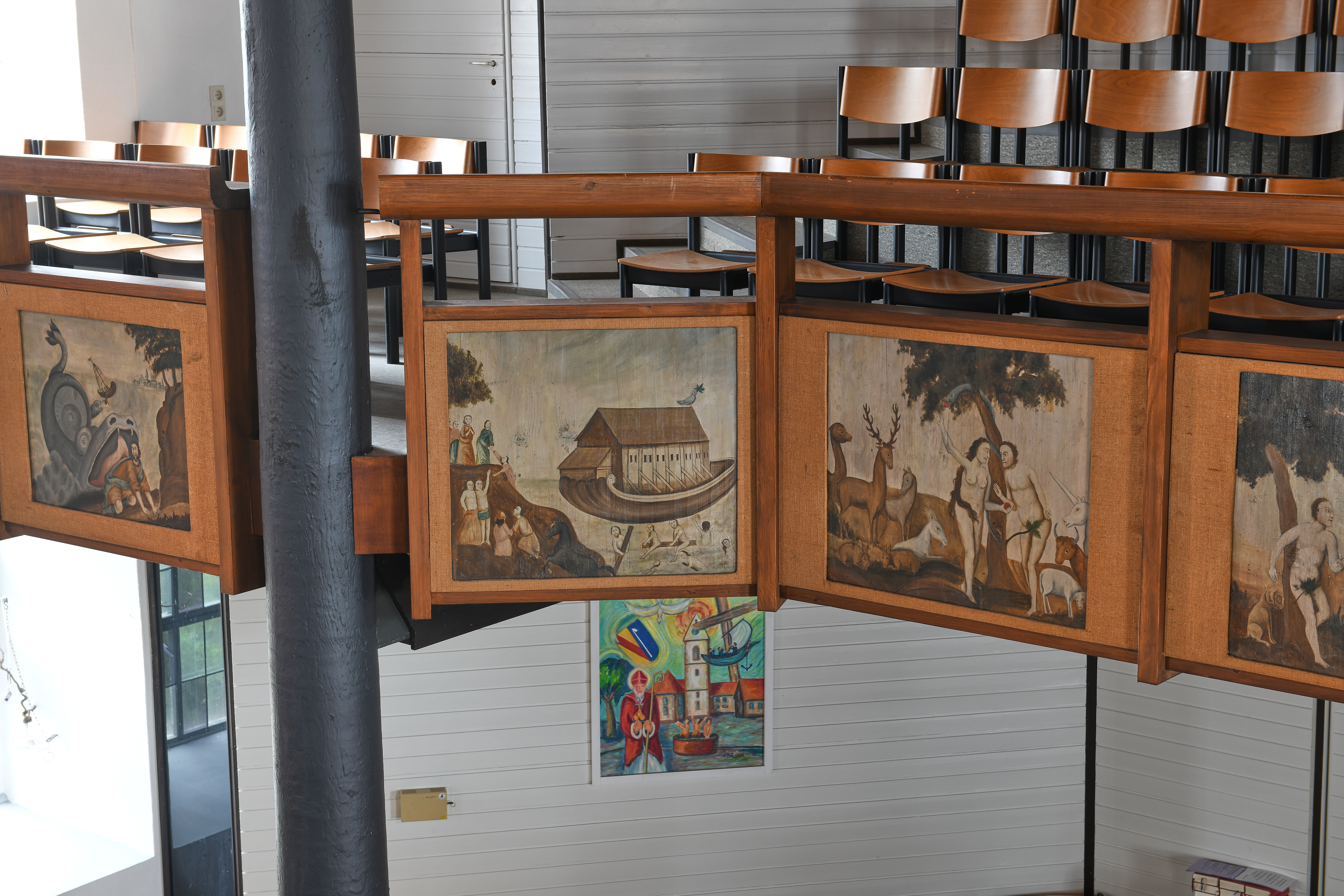 Hauinger Kirche: Sicht von der Empore